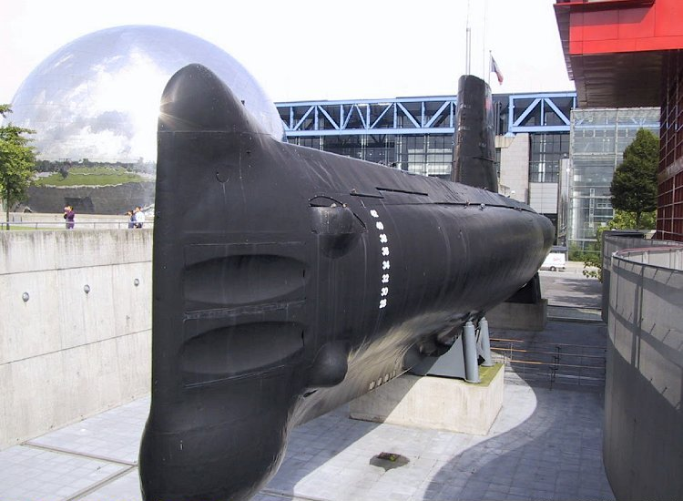 Sous-marin français Argonaute à la Cité des Sciences (Paris) Original caption: " Photo © Guillaume Rueda"